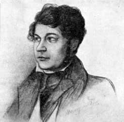 Виктор Николаевич Забила(1808—1869) — украинский поэт XIX века